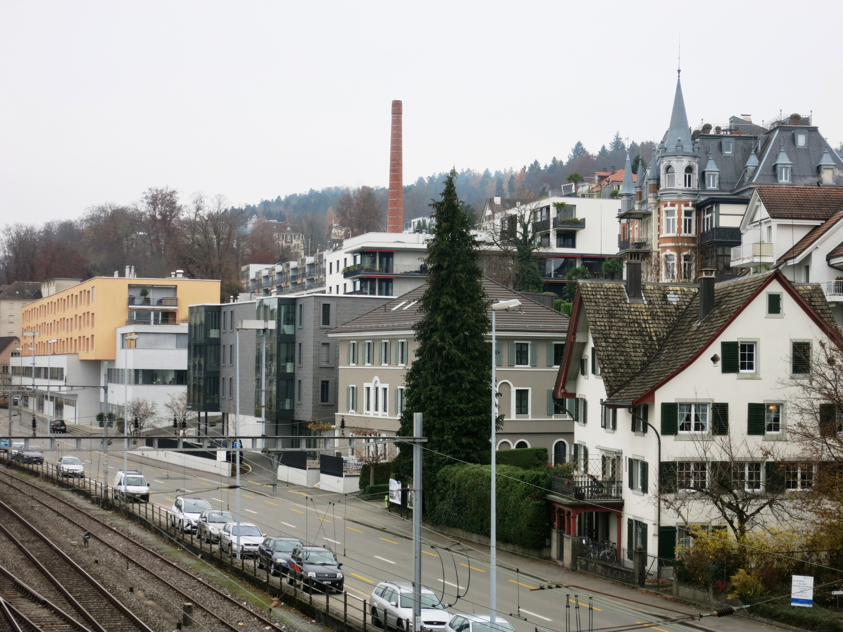 Brauereiareal Wädenswil mit Brauerei Villa von 1896, Wädenswil ZH, Schweiz